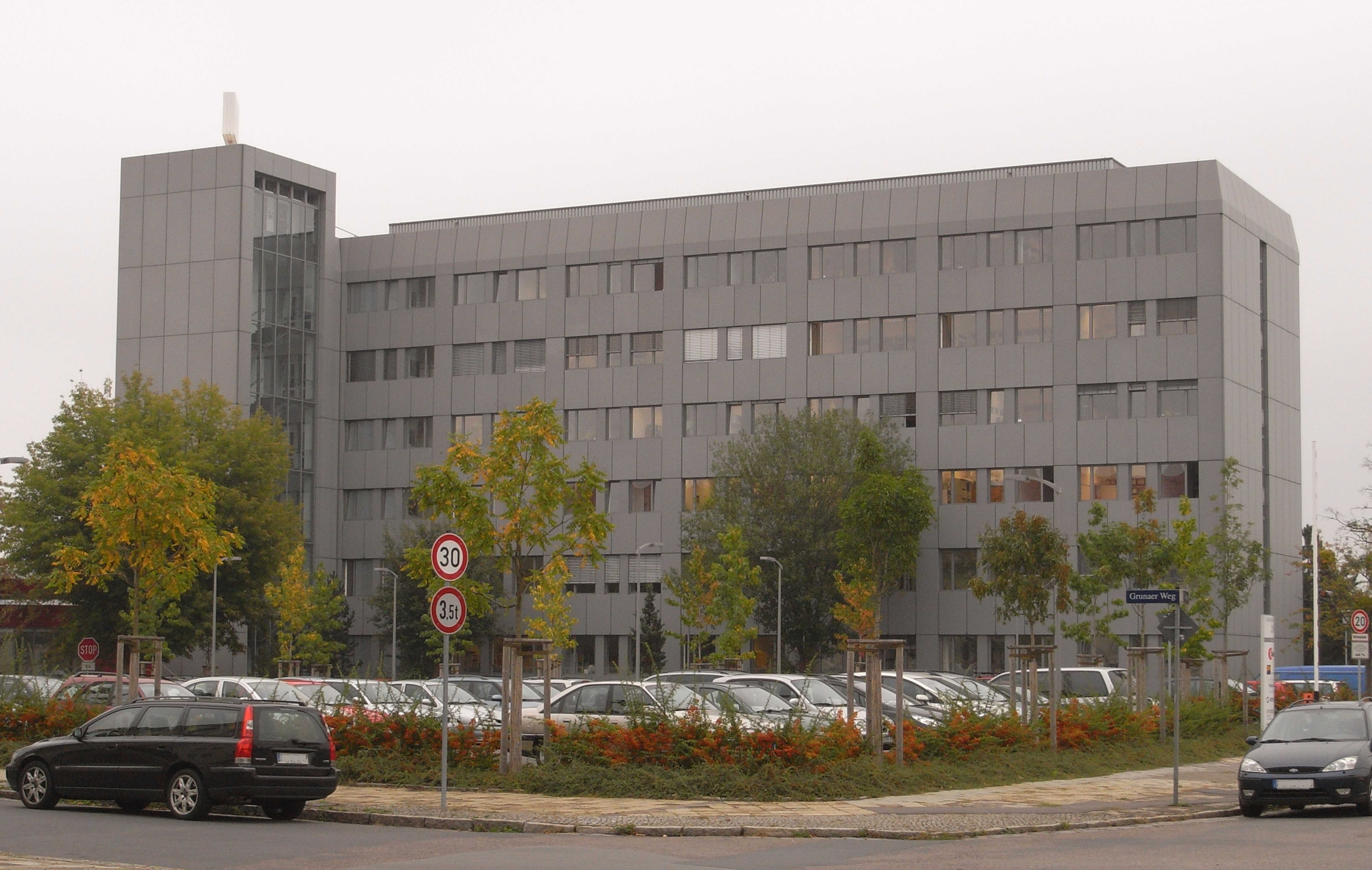 Betriebsgebäude Grunaer Weg 26 (Dresden)